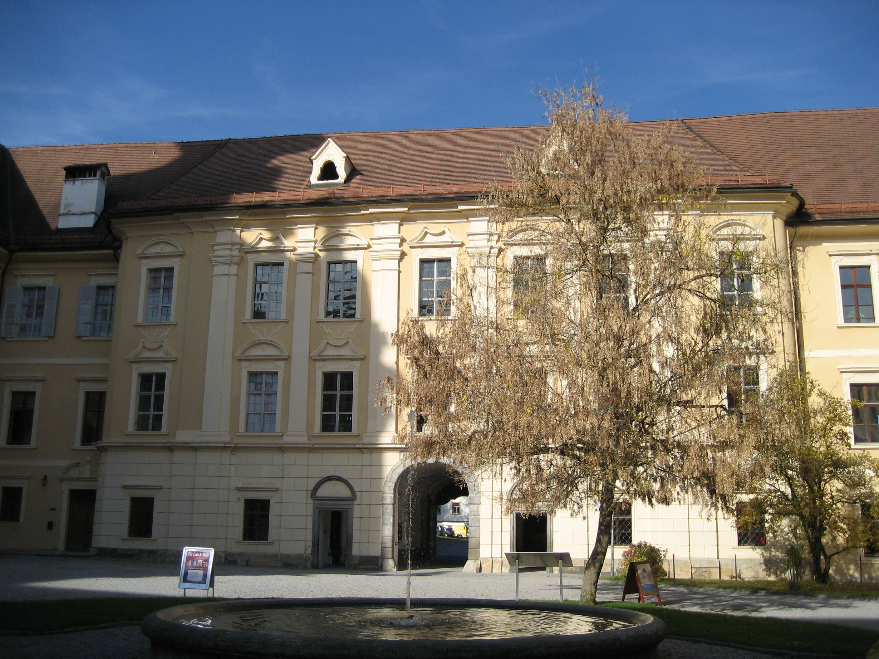 Stift Rein (in der Nähe von Graz, Österreich); Stiftshof / Stift Rein in Styria, Austria